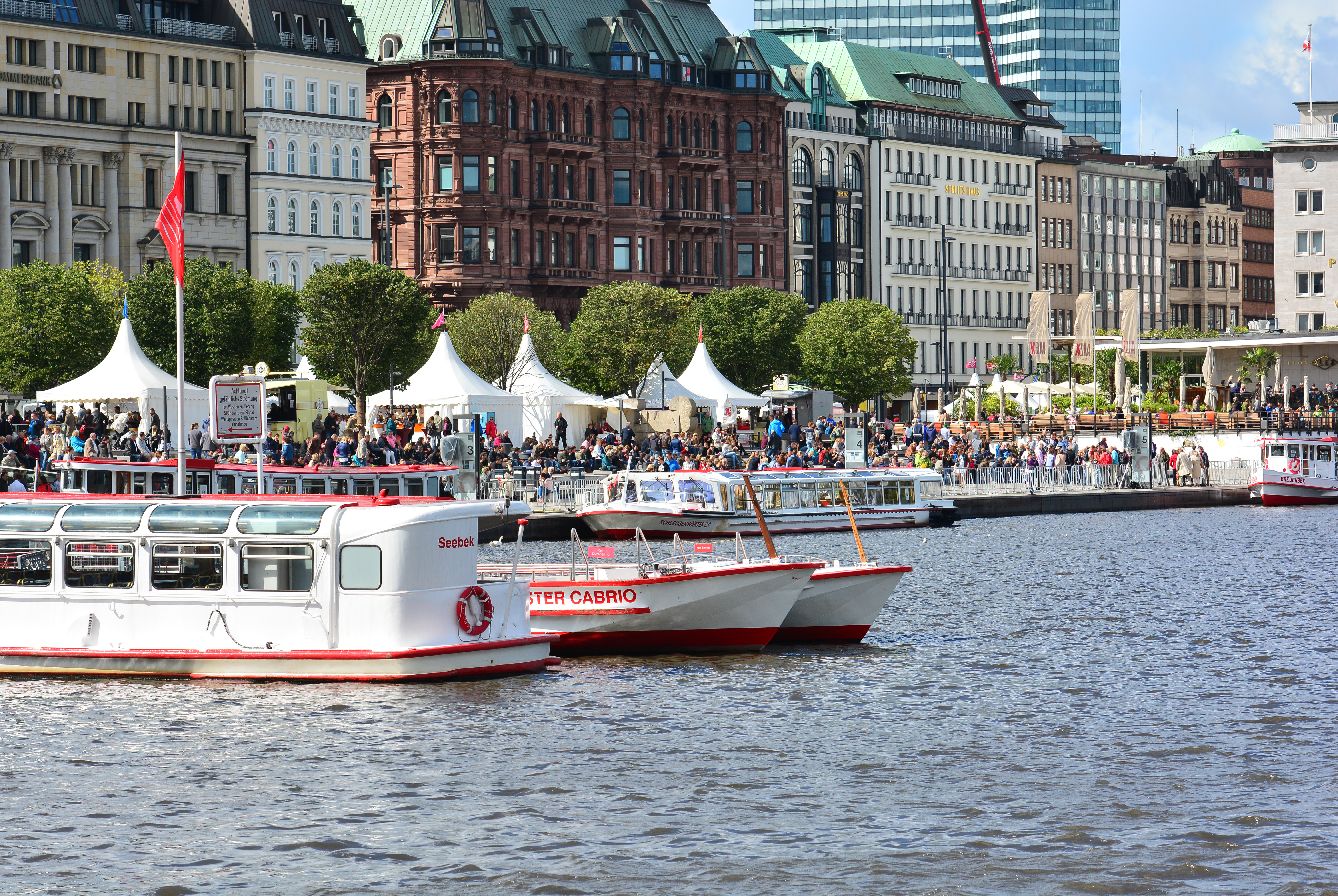 Impessionen vom Alstervergnügen 2015